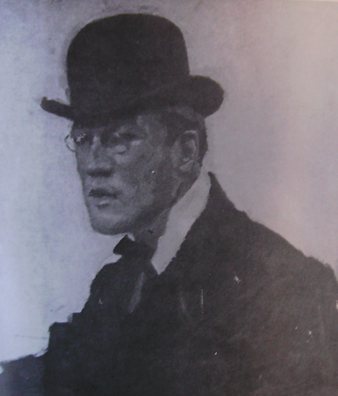 Portrait du peintre Rudolf Lévy par Albert Weisgerber